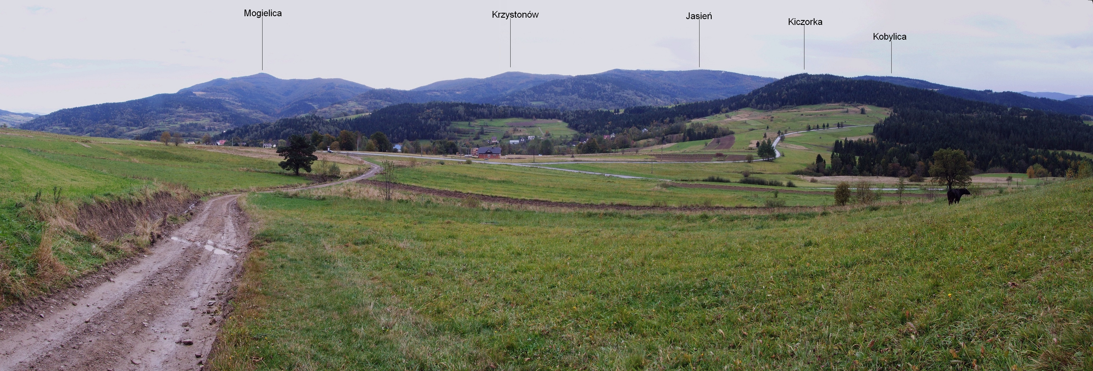 Widok z podnóży Ćwilina